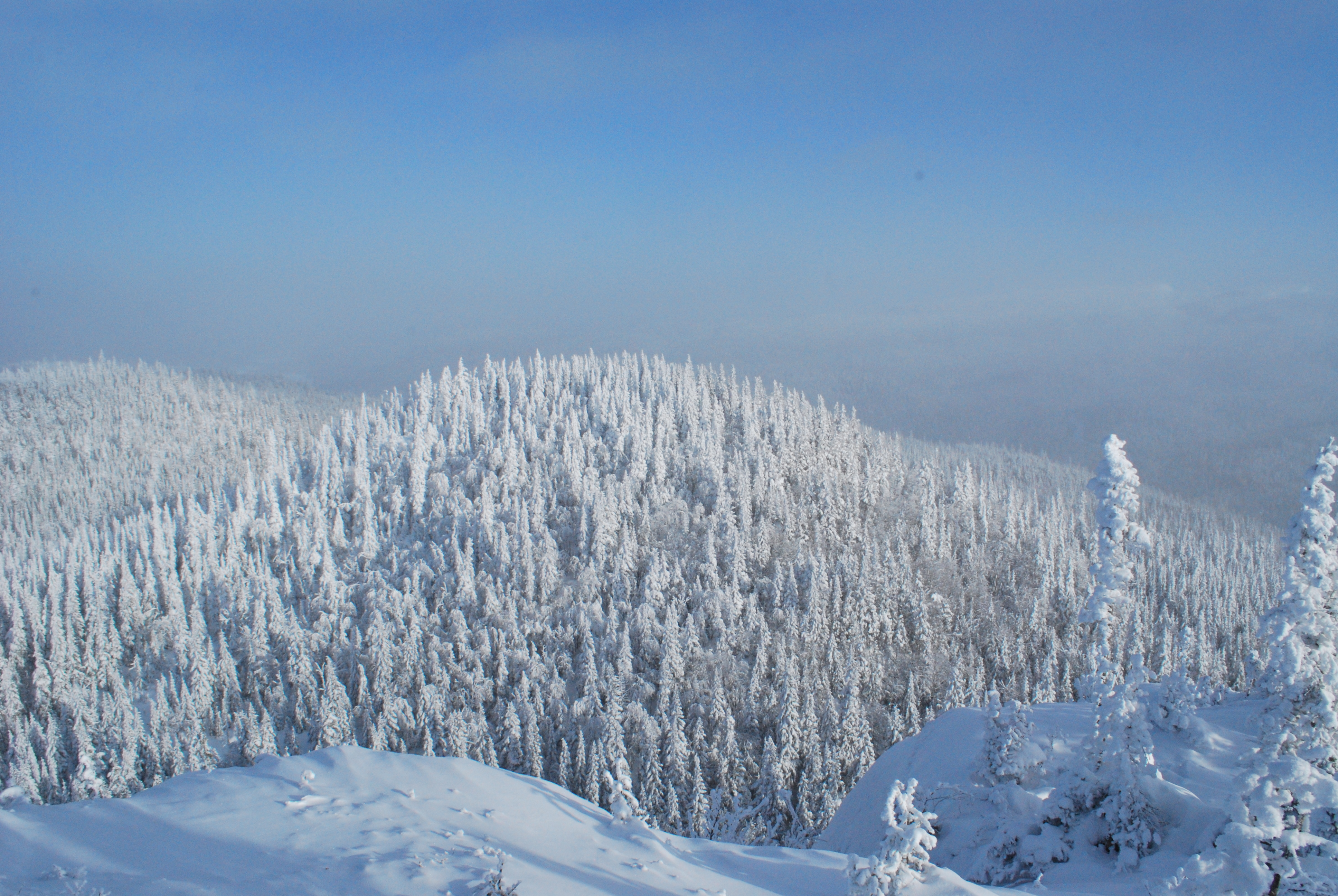 Sentier de promenade en raquette au Valinouët, Québec.